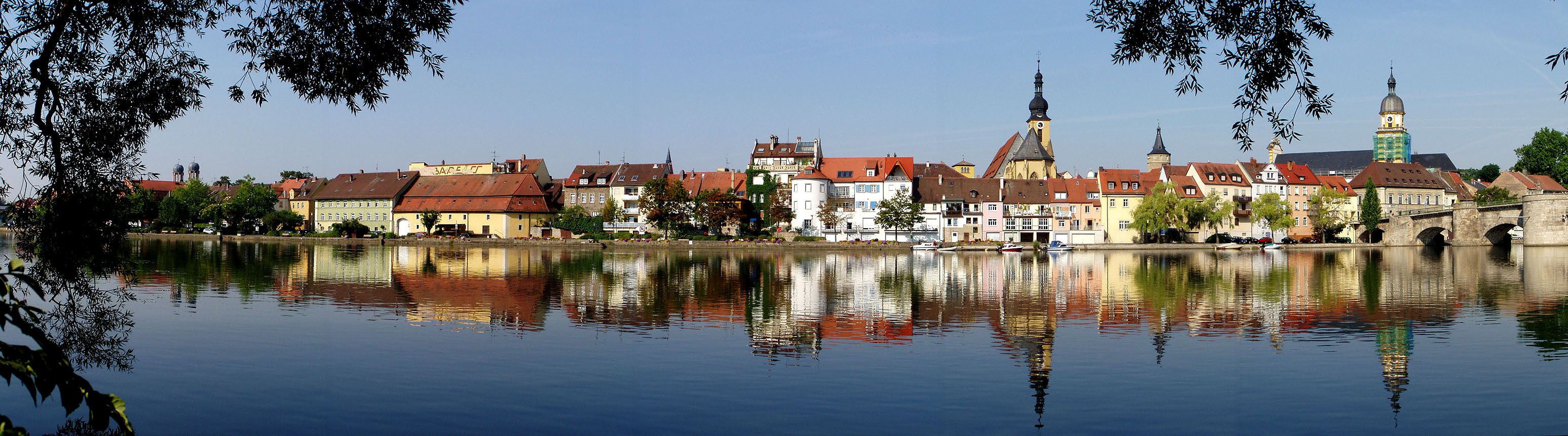 Uferpromenade von Kitzingen/Main